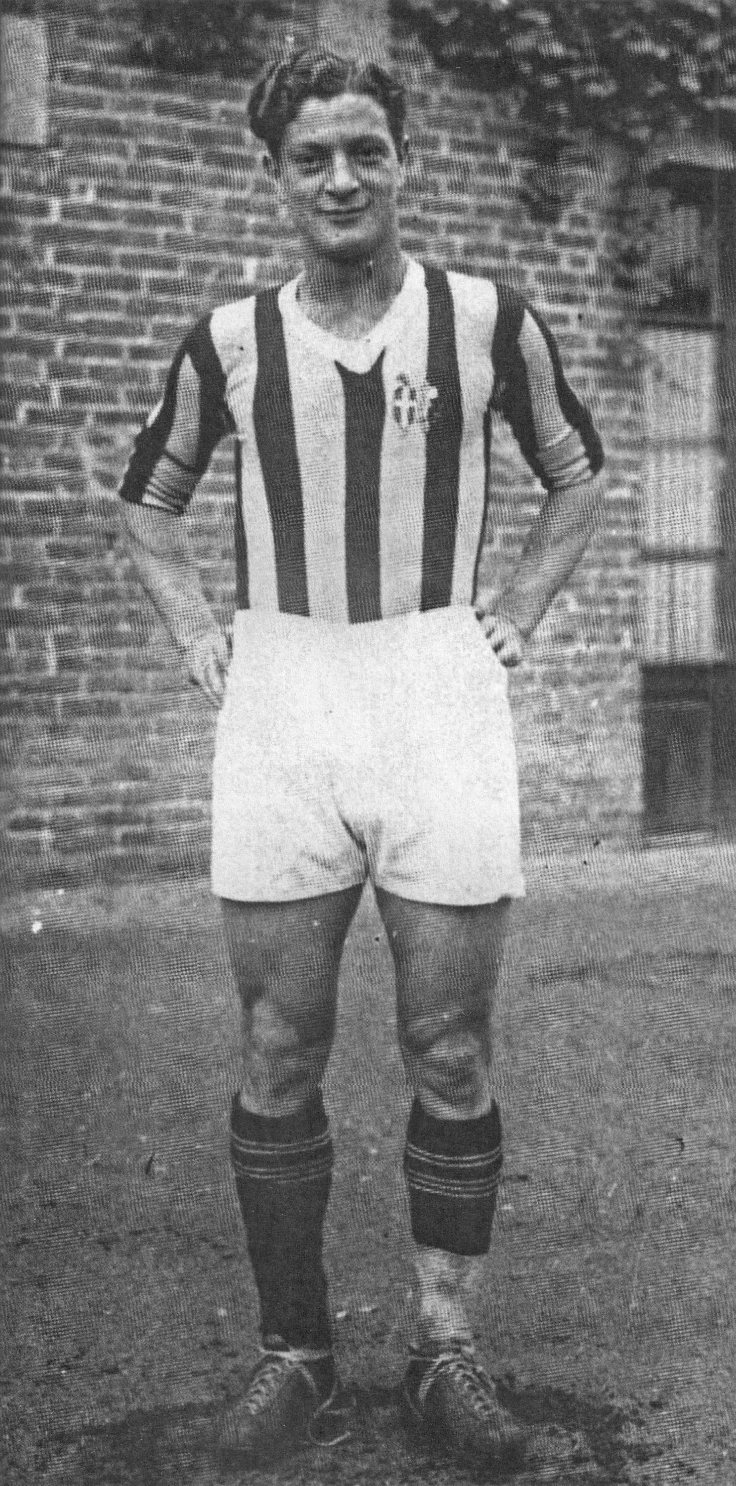 Il calciatore italo-argentino Renato Cesarini alla Juventus nella prima metà degli anni 30 del XX secolo, fotografato all'esterno dello stadio di Corso Marsiglia (Campo Juventus) di Torino.